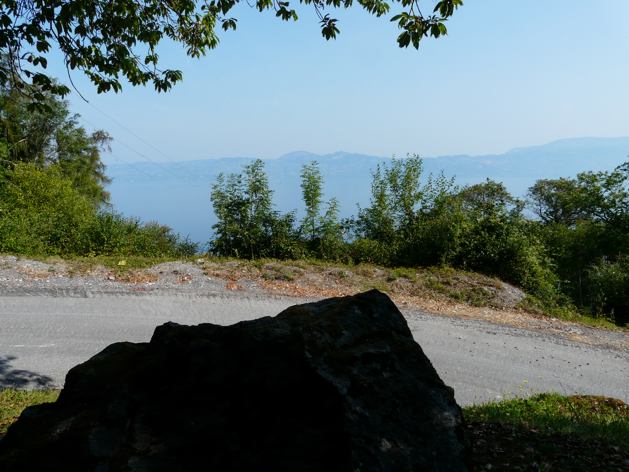 La "pierre à Jean-Jacques Rousseau" à Meillerie (Haute-Savoie) devant le lac Léman